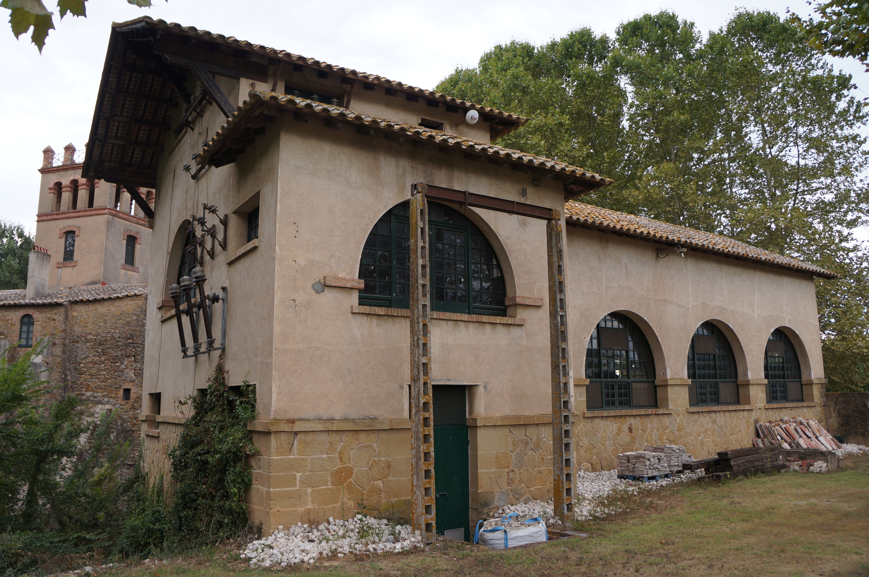 Central Elèctrica Vinyals